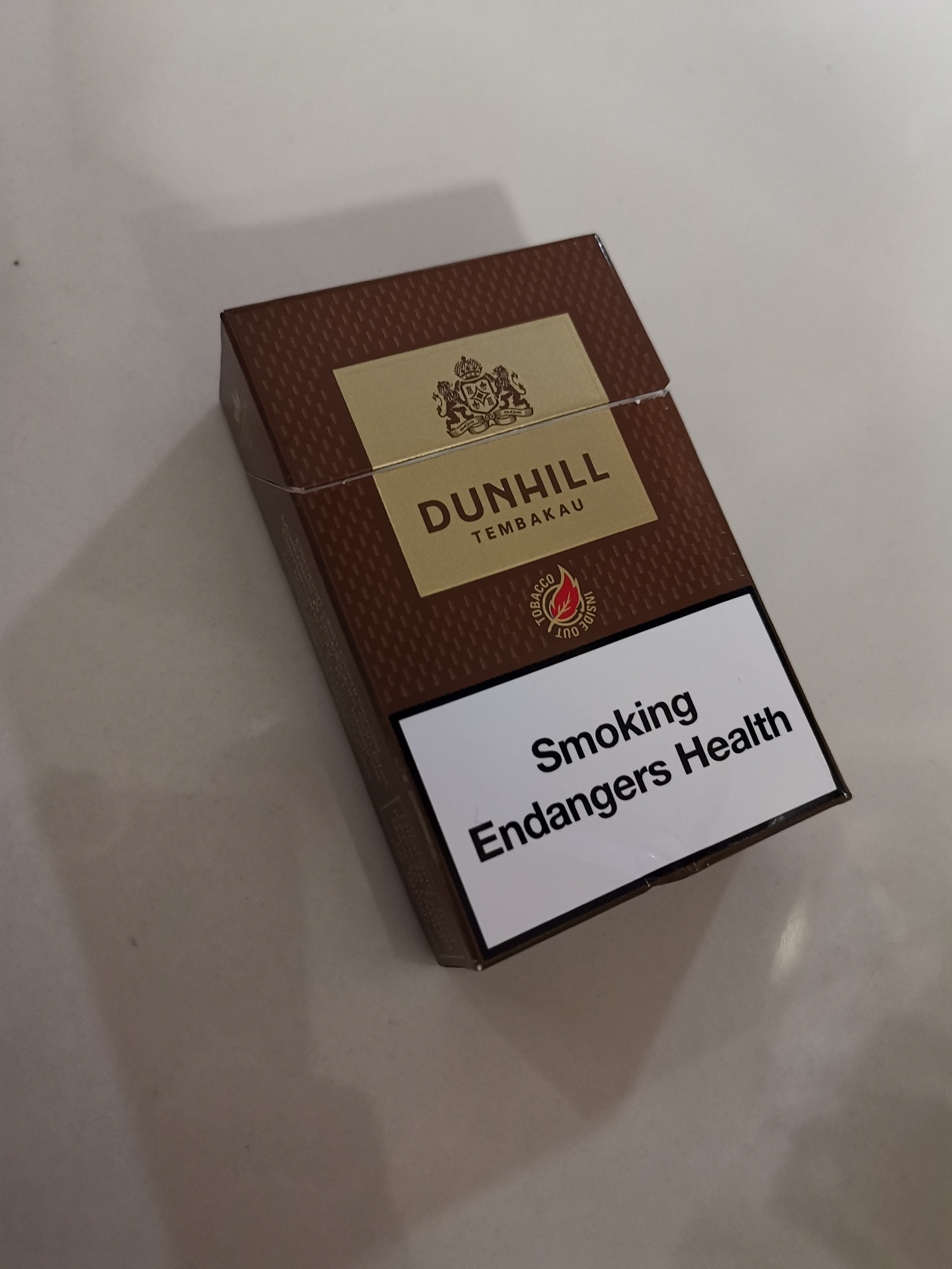 Gambar pek Dunhill Tembakau